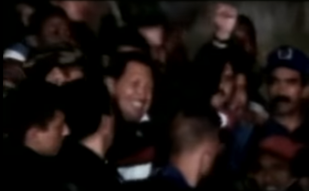 Regreso del presidente Chávez luego del golpe de Estado de 2002